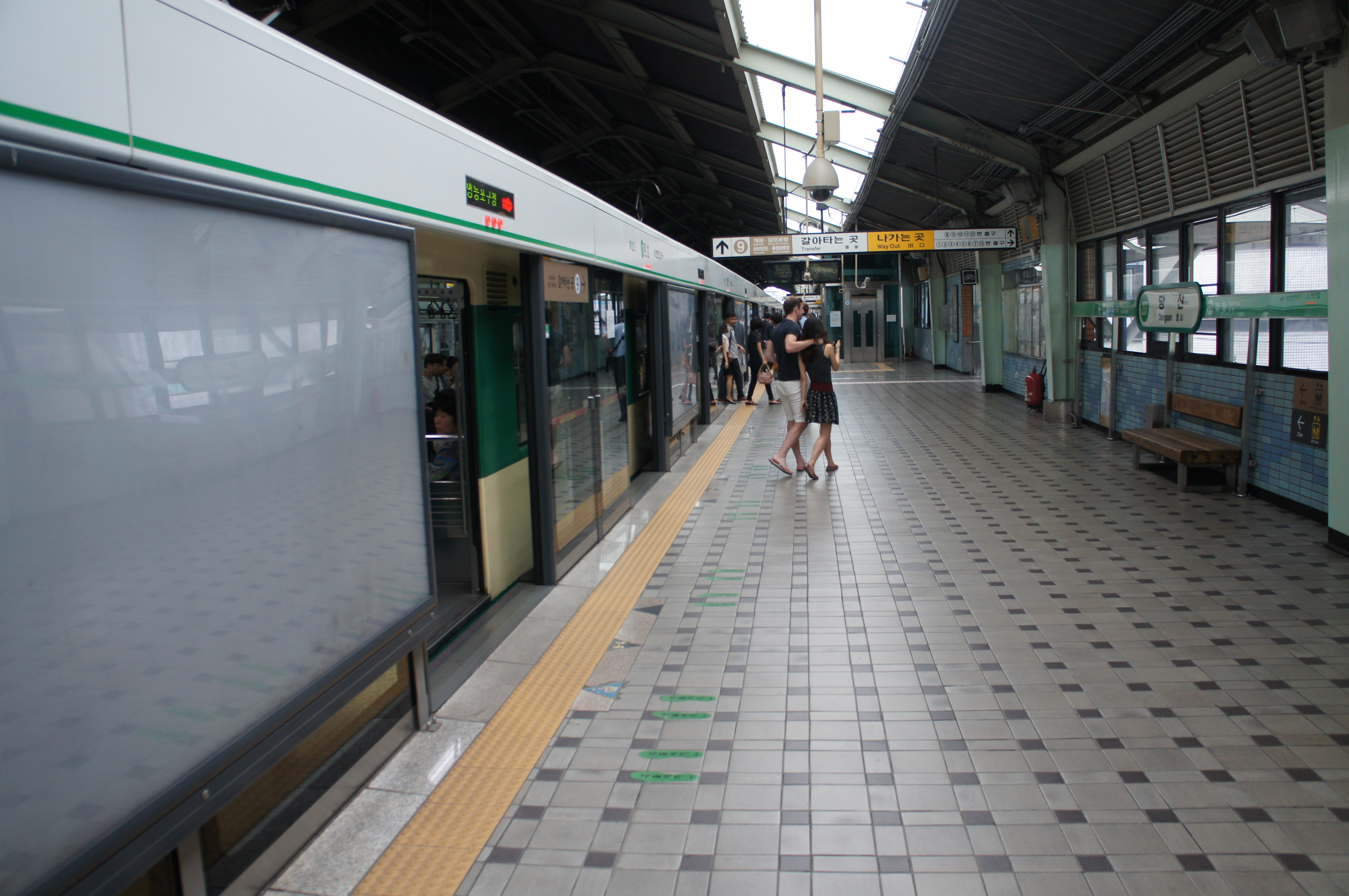 당산역 승강장